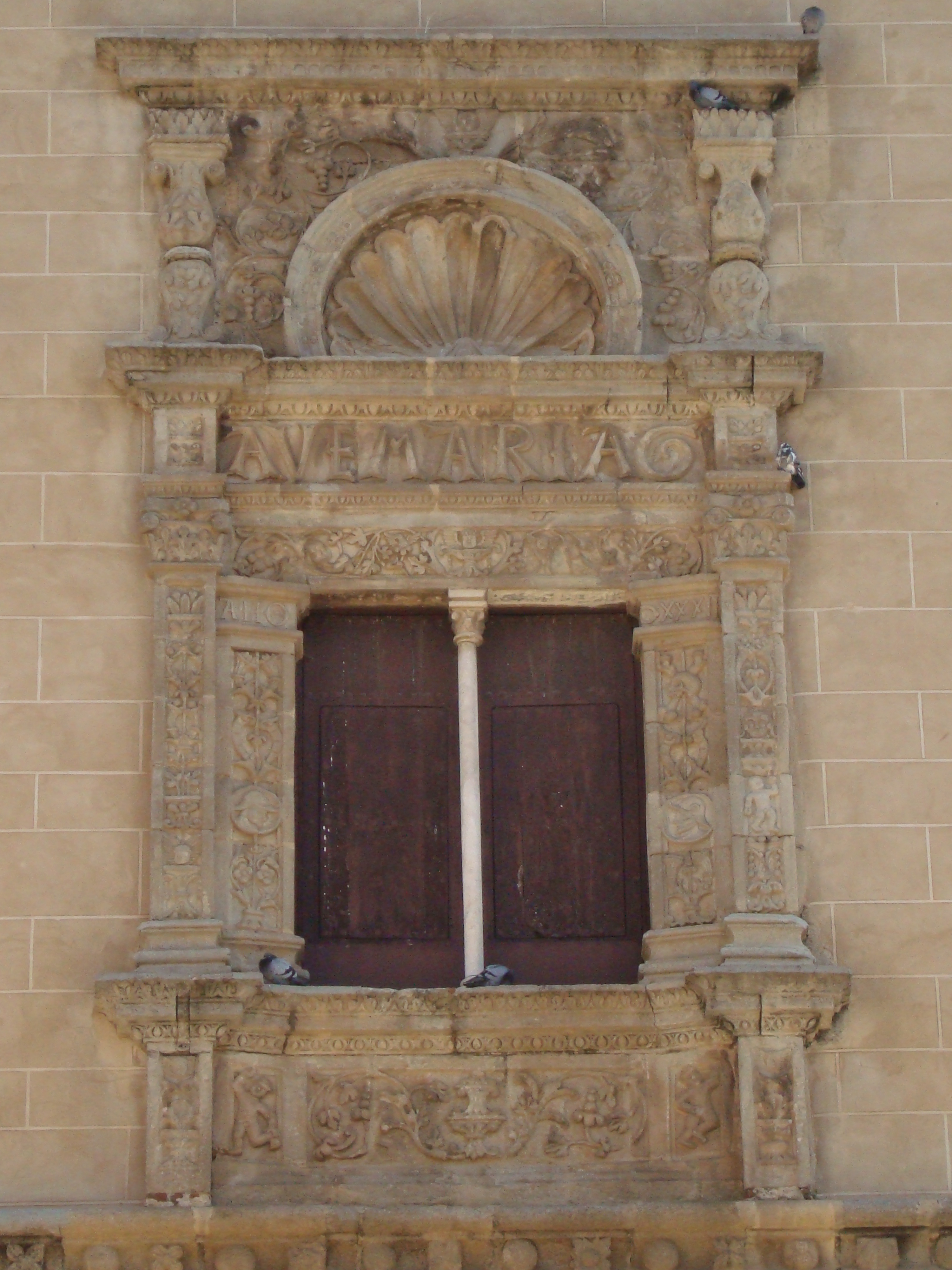 Ventana plateresca catedral badajoz